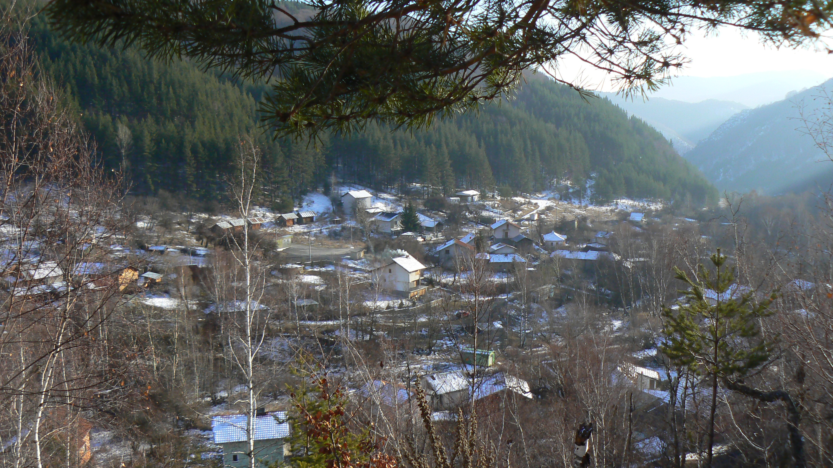 Изглед отвисоко към село Чуйпетлово, България. Village Chuipetlovo, Bulgaria (view from above)